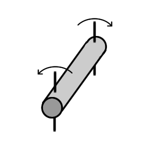 Darstellung der Torsionskraft